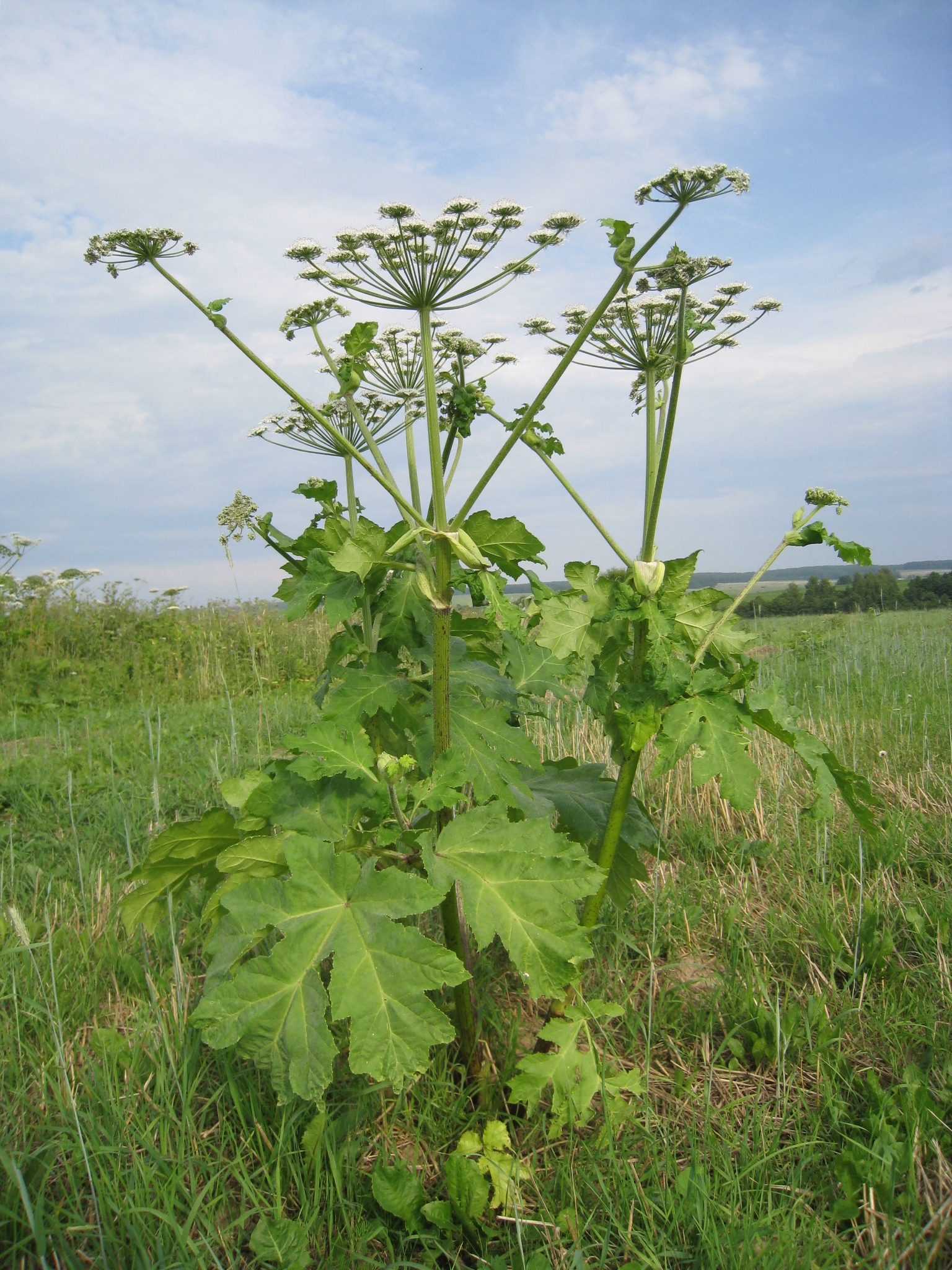 Heracléum sosnówskyi